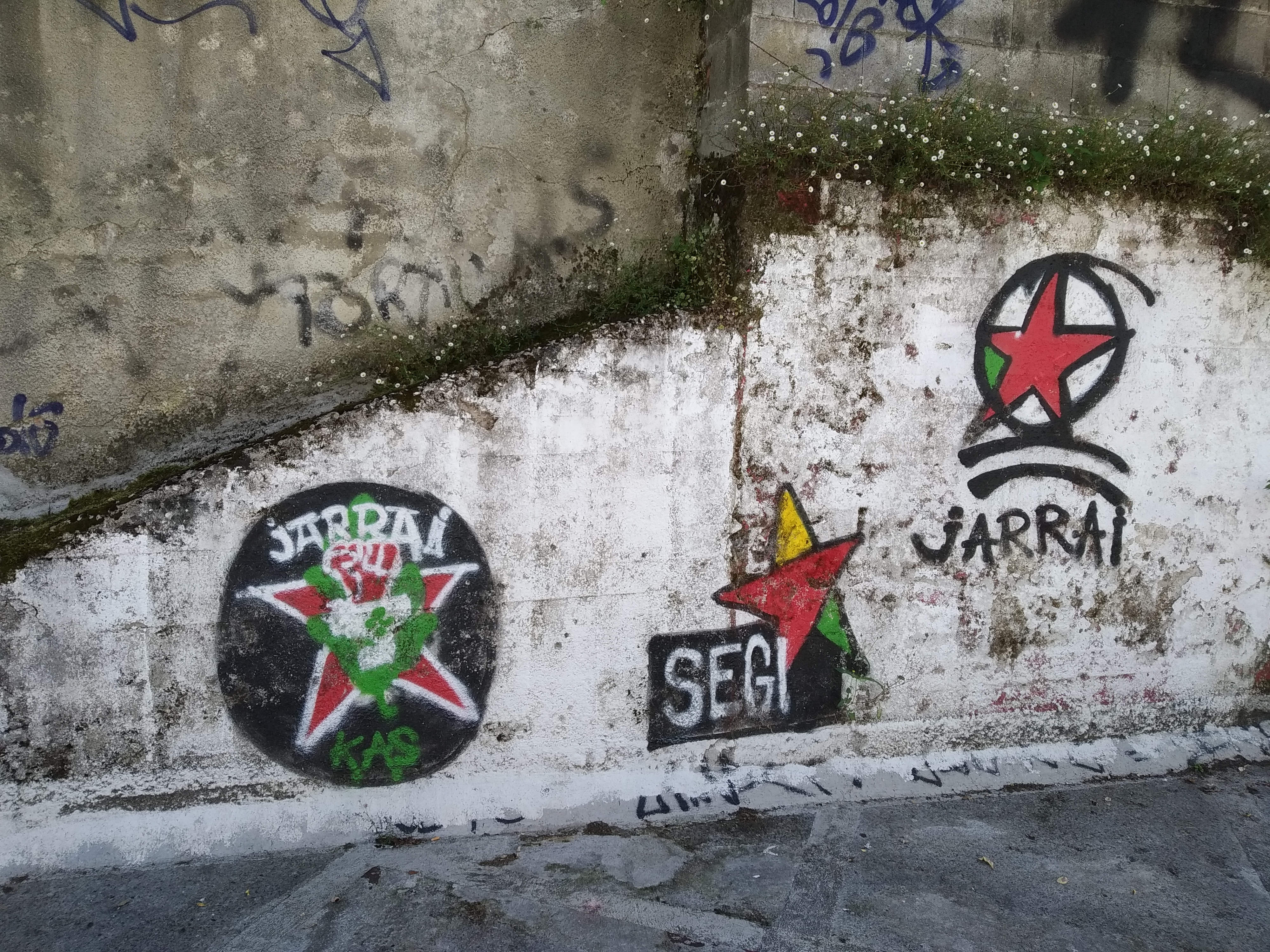 ikurrak, Eibarko horma batean